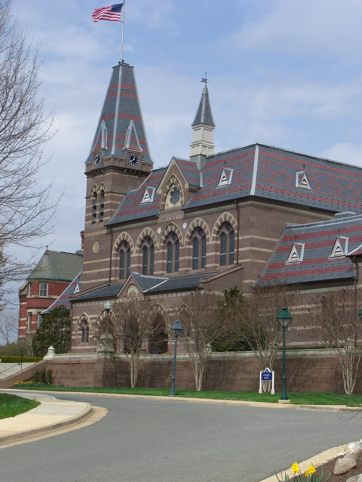 Gallaudet